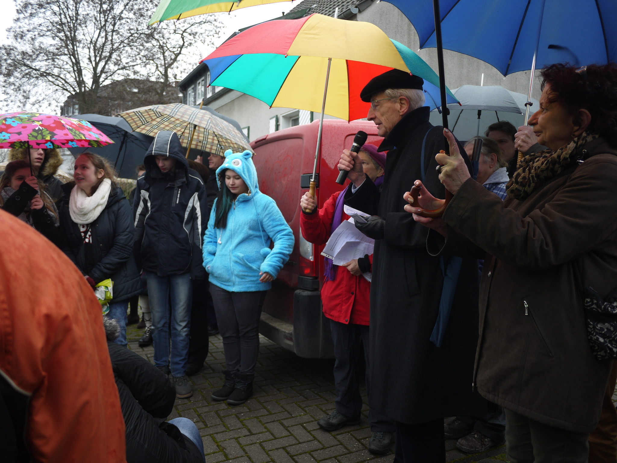 Gedenkrede von Jürgen Schmude bei der Verlegung von Stolpersteinen in Moers am 24.11.2015 für Reinhold Büttner, den Vater seines Vorgängers als MdB Fritz Büttner